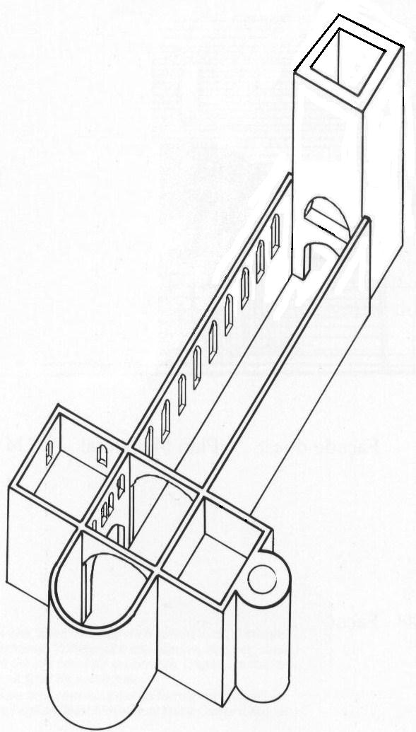 reconstitution de ce que devait-être l'église saint maurice d"épinal lors de sa consécration par Léon IX en 1050.